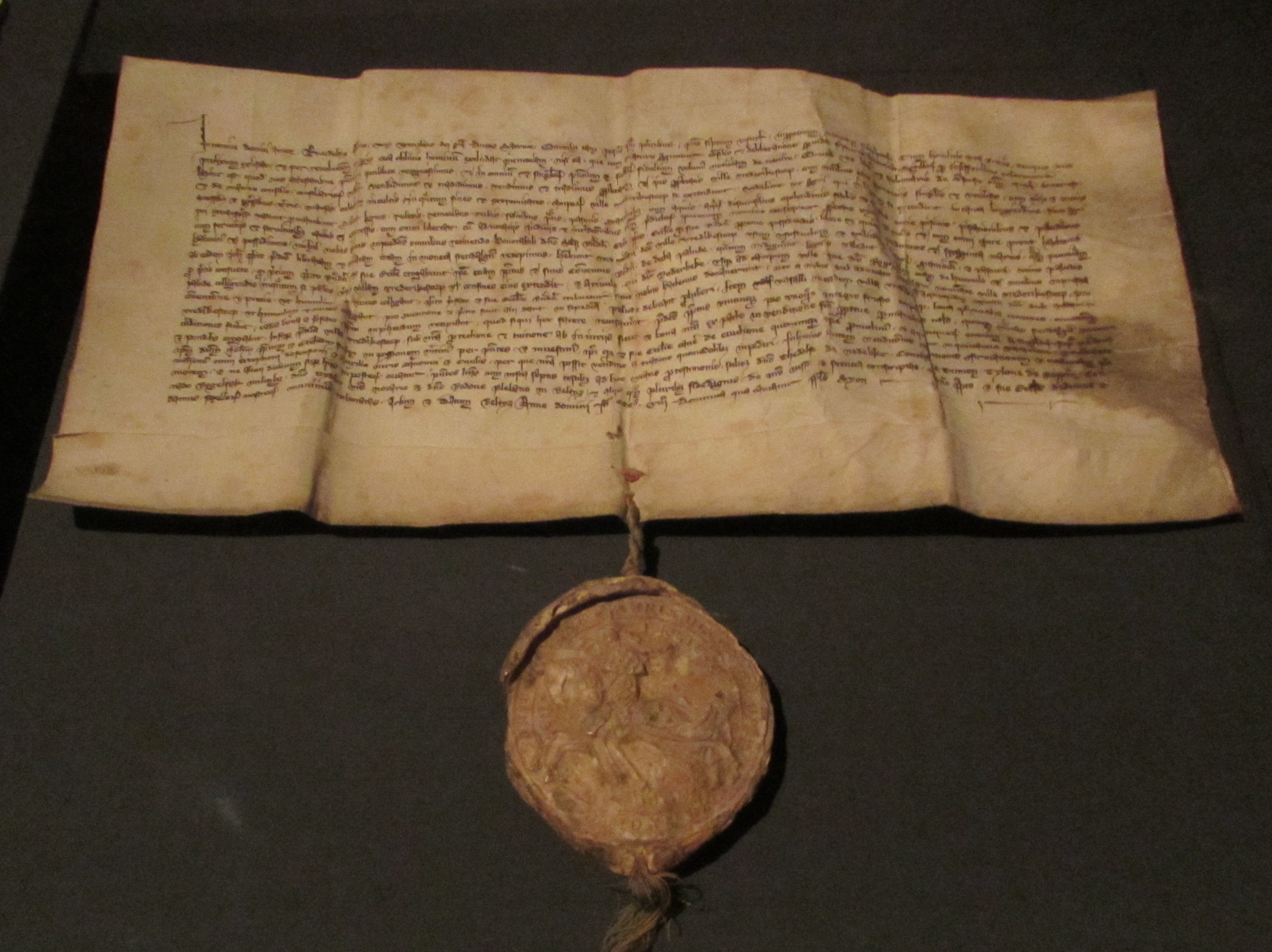 Verkaufsurkunde des Dorfes Fredersdorf durch Albrecht und Wenzel von Sachsen an das brandenburgische Domkapitel, 9. Dezember 1313, Domstiftsarchiv Brandenburg